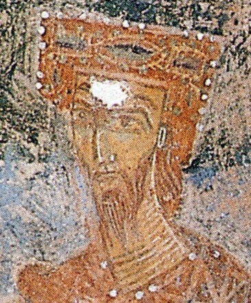 Први српски краљ,Михајло Војислављевић,ктиторски портрет из цркве светог Михајла у Стону.